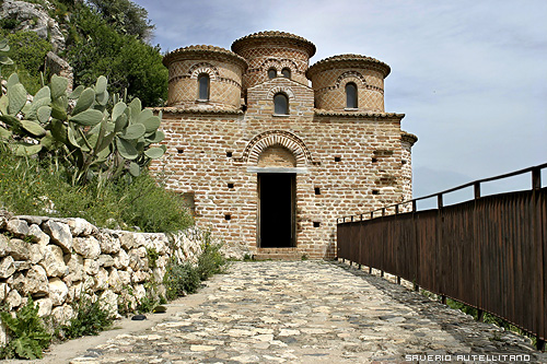 la "Cattolica" — di Stilo (Reggio Calabria). Foto concessa dall'Autore - Saverio Autellitano, - purché se ne citi e se ne riconosca la paternità anche su opere derivate.